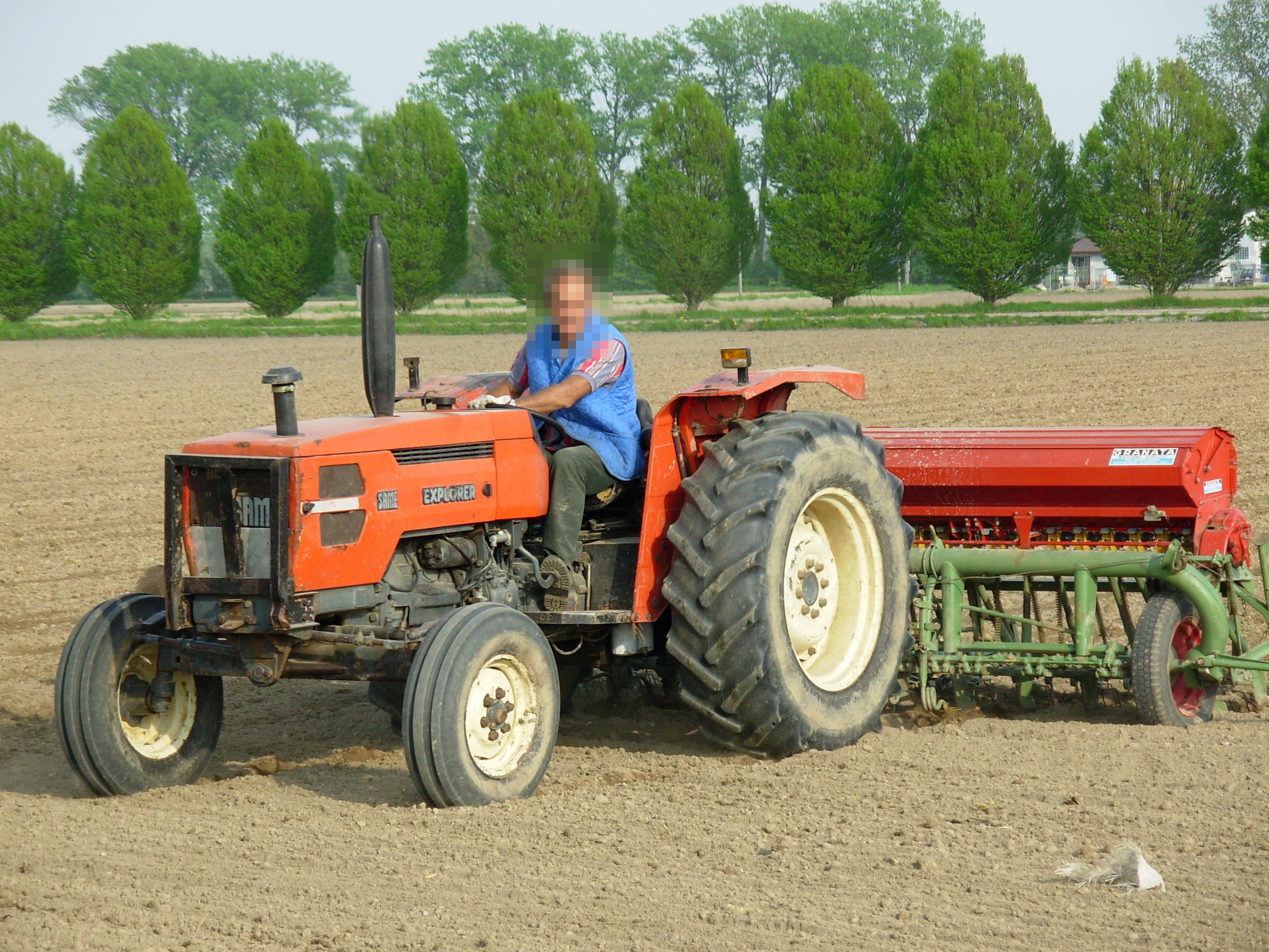 Trattore SAME Explorer, Italia